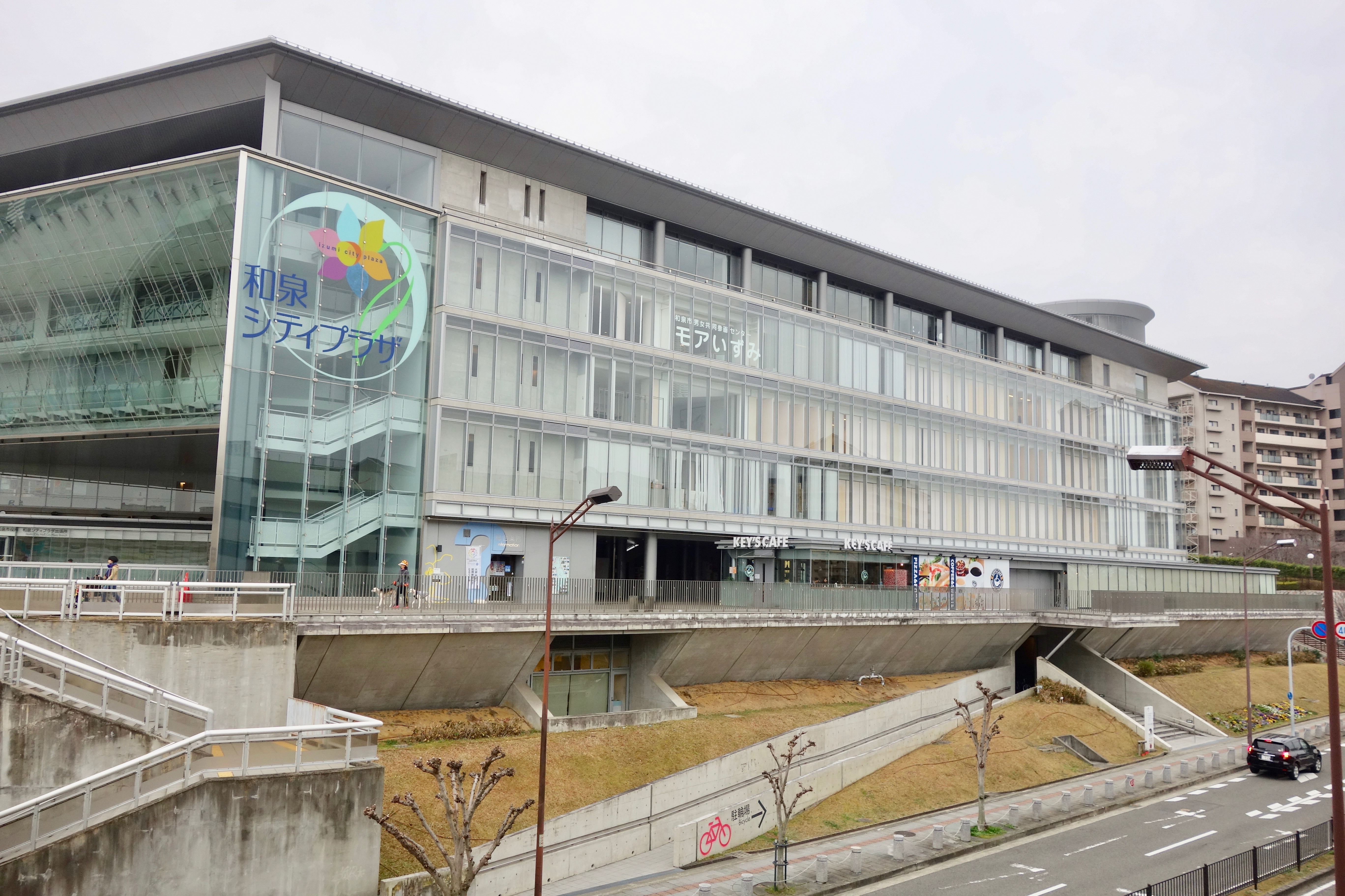 シティプラザ図書館外観